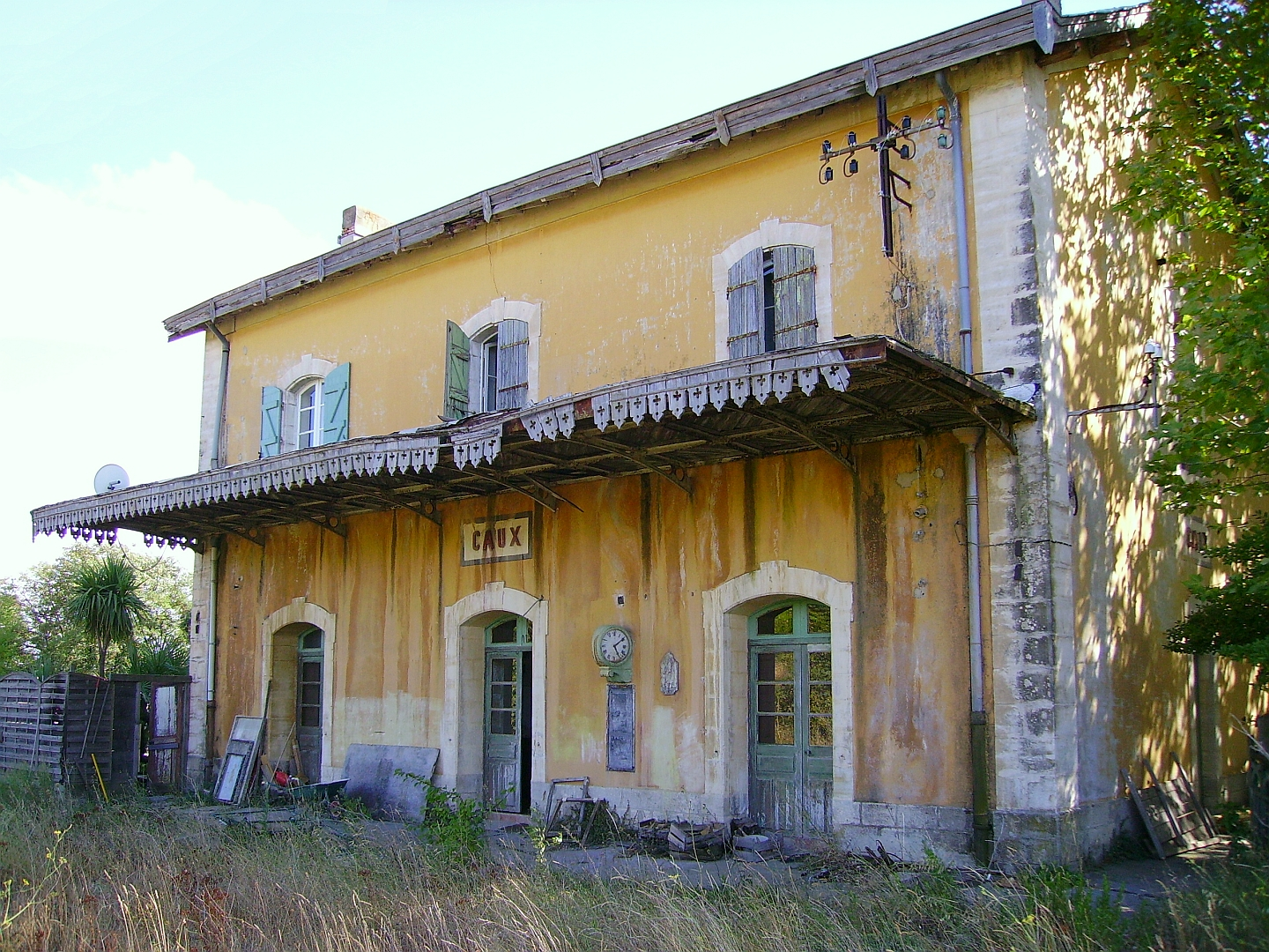 Le bâtiment voyageurs de l'ancienne gare de Caux (Hérault) le 2 août 2009.